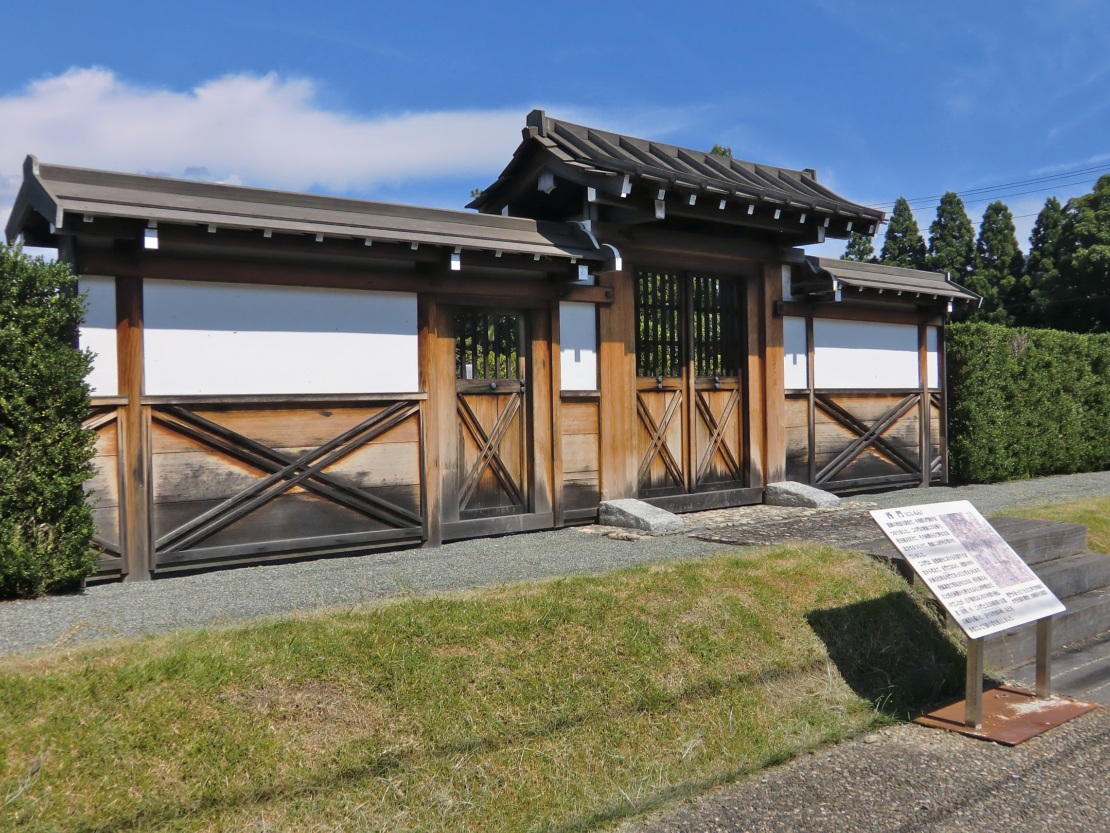 龍福寺（山口市）に復元された大内氏館跡の西門